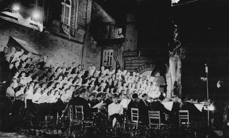 Zentralbild Kollektiv 10.6.1960 3. Arbeiterfestspiele des FDGB. Uraufführung der "Chronik des Roland von Stendal". Bereits am Vorabend der Eröffnung der 3. Arbeiterfestspiele (9.6.1961) wurde auf dem Stendaler Marktplatz das von einem Autorenkollektiv geschaffene Oratorium "Höret die Kunde - die Chronik des Roland zu Stendal" uraufgeführt. Im Mittelpunkt des Werkes, das die Geschichte der Altmarkstadt von Anfang des 12. Jahrhunderts bis in die jüngste Gegenwart schildert, steht der Stendaler Roland, ein jahrhundertealtes Standbild vor dem ehrwürdigen Rathaus. An der Aufführung wirkten Berufs- und Laienkünstler - drei Chöre, Solisten und das Orchester des Theaters der Altmark - mit. UBz: Während der Veranstaltung.